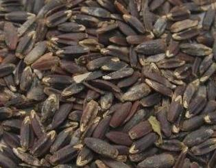 Lallemantia iberica, Ölziest Samen